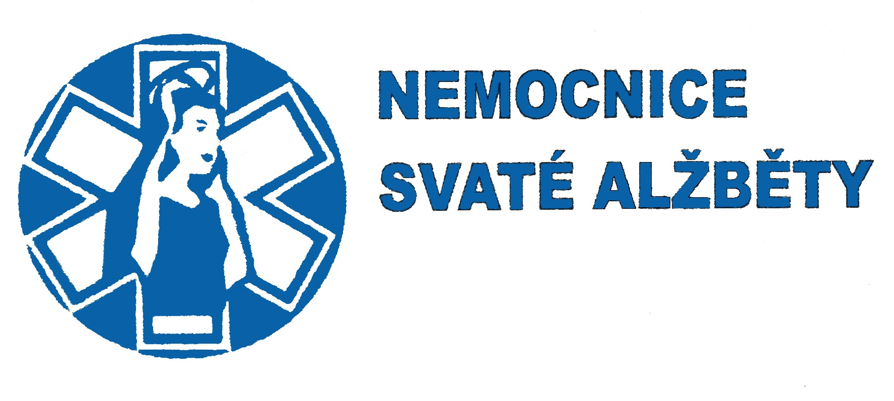 Praha, klášter a nemocnice u sv. Alžběty